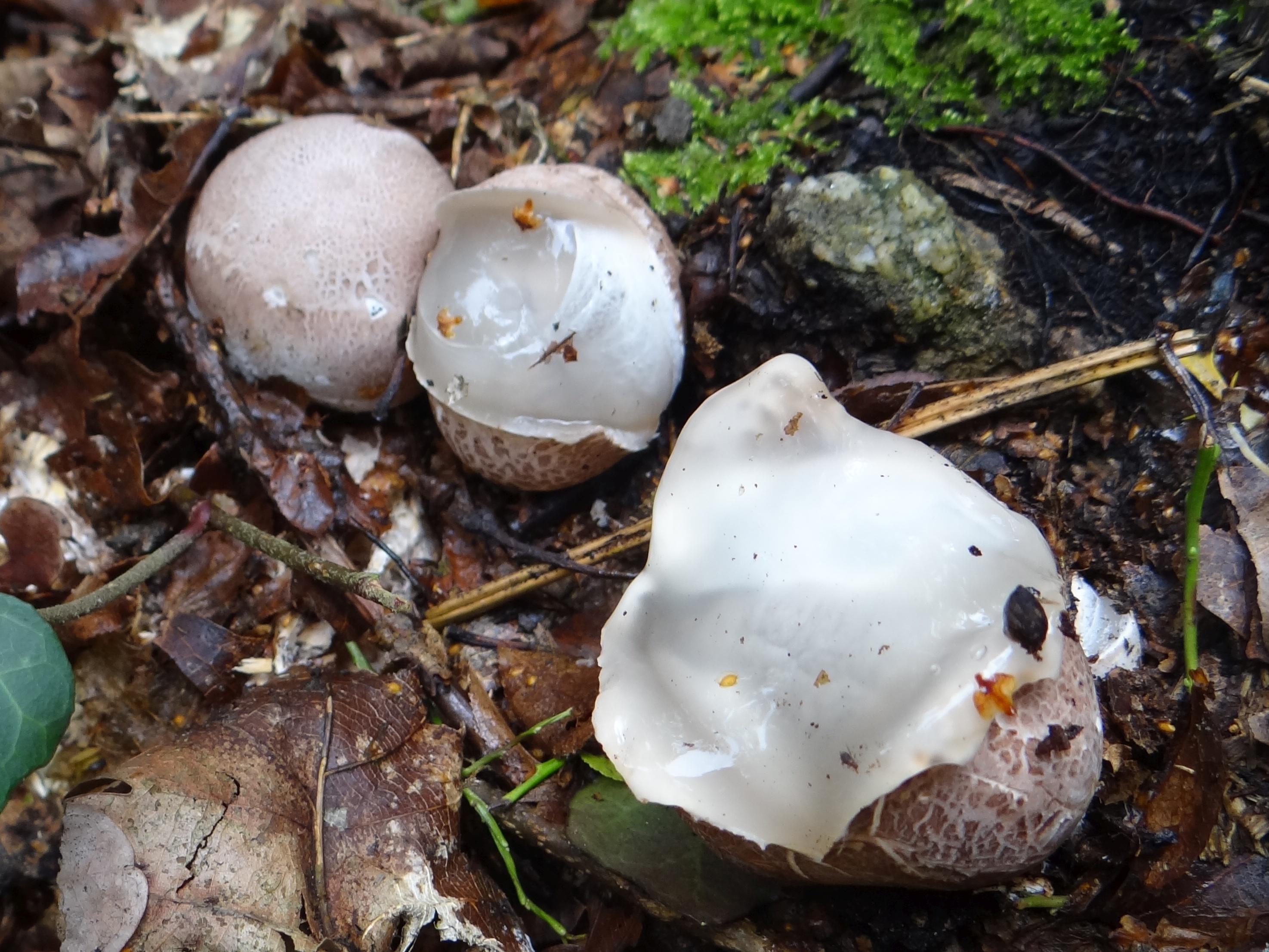 Phallus impudicus (location: Poland, Kamionna, województwo małopolskie)